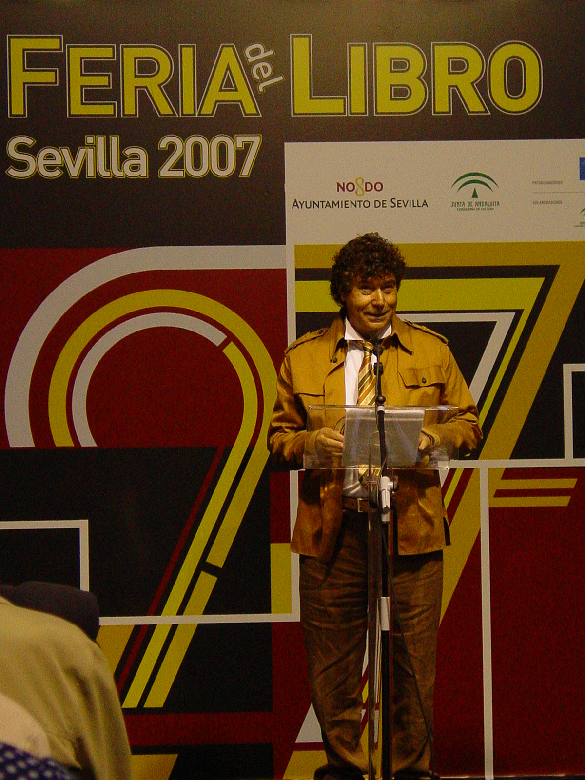 Quintero a la Feria del Libro Sevilla 2007 (2)